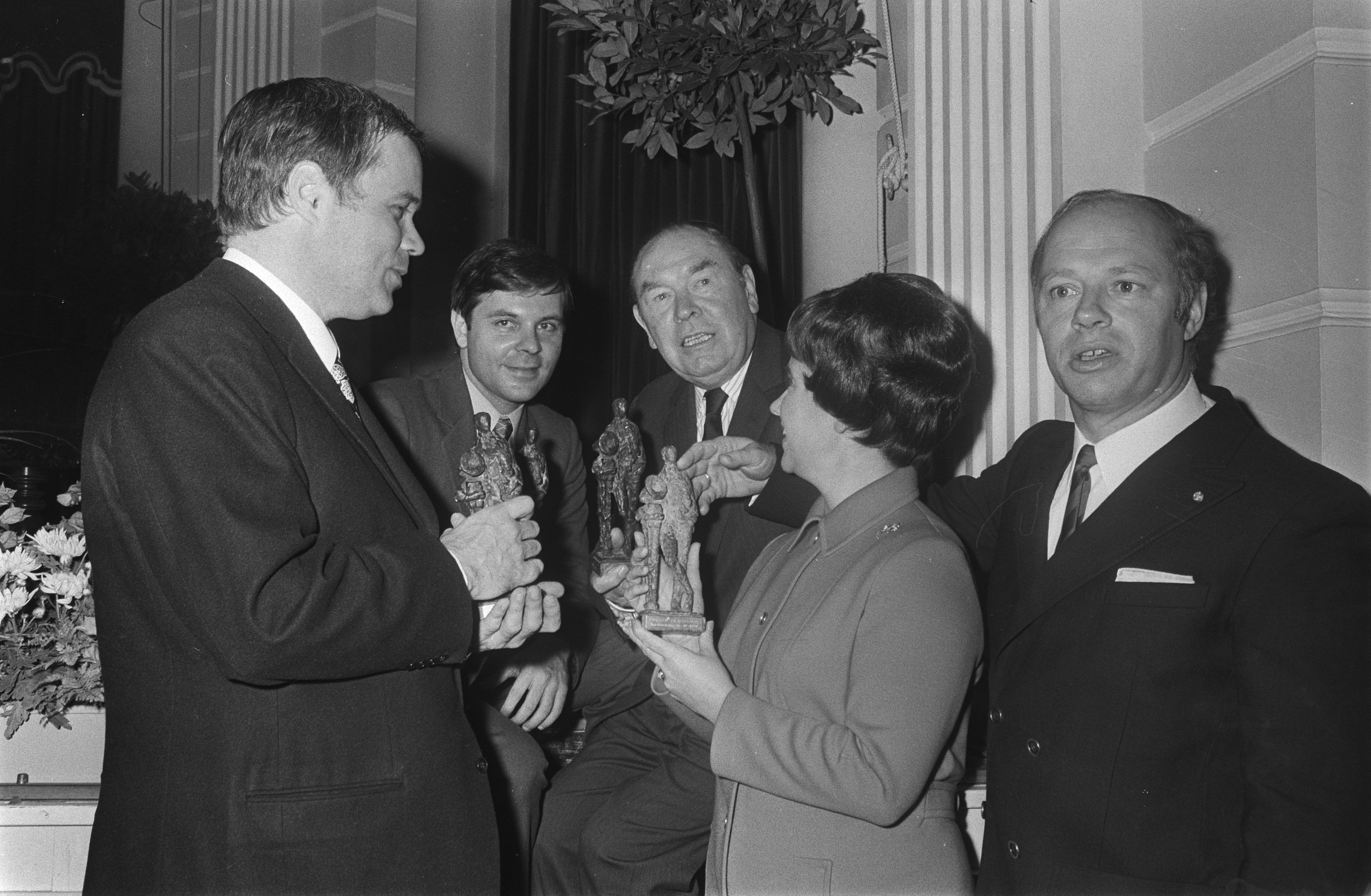 Collectie / Archief : Fotocollectie Anefo Reportage / Serie : [ onbekend ] Beschrijving : Edisons klassiek 1970 zijn uitgereikt in Concertgebouw, Amsterdam; enkele winnaars v.l.n.r. zanger D. Fischer , S. Bisschop , G. Moore , E. Ameling , B. Haitink / Datum : 16 oktober 1970 Locatie : Amsterdam, Noord-Holland Trefwoorden : CONCERTGEBOUWEN, Winnaars, zangers Persoonsnaam : D. Fischer, E. Ameling, Edisons klassiek, G. Moore, S. Bisschop Fotograaf : Koch, Eric / Anefo Auteursrechthebbende : Nationaal Archief Materiaalsoort : Negatief (zwart/wit) Nummer archiefinventaris : bekijk toegang 2.24.01.05 Bestanddeelnummer : 923-9293 Reacties Geplaatst door Cultuurmens op 08 februari 2017 - 16:29. V.l.n.r. operazanger (bariton) Dietrich Fischer-Dieskau, Stephan Bishop (pianist) Gerard Moore (pianist), Elly Ameling (sopraan) en Bernard Haitink (dirigent) Zie ook